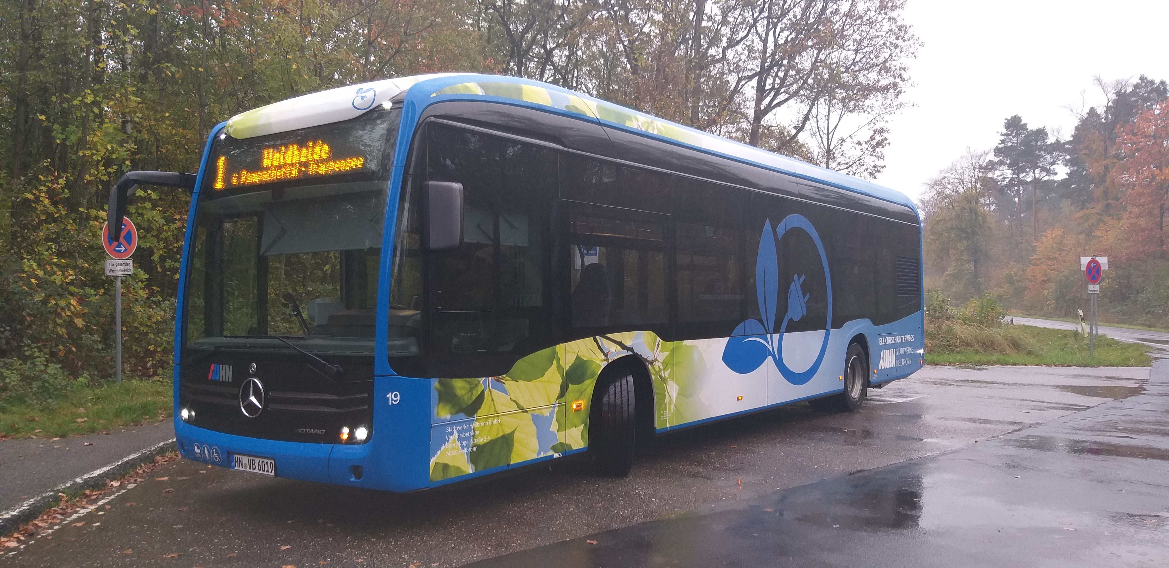 eCitaro der Stadtwerke Heilbronn Verkehrsbetriebe an der Waldheide, Heilbronn